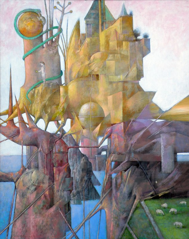 Eve, Small and Frightened, in a Difficult Moment in her life - Oil on canvas 100x 81 - 1994